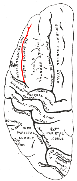 interior frontal sulcus.